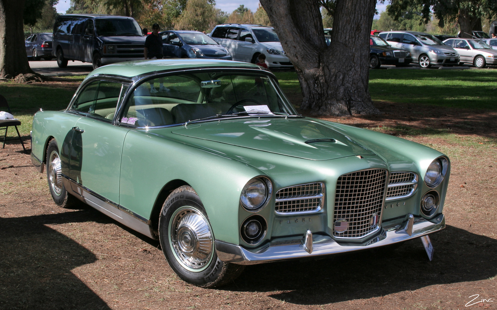 1957 Facel Vega FVS FV4 - green - fvr